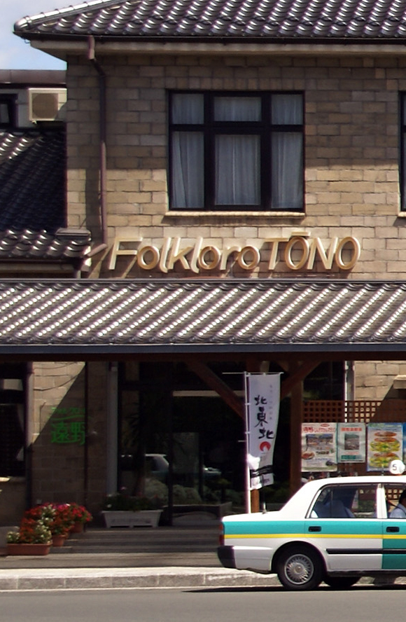 Fotdetalo kiu montras la dulingvan stacinomon "Folkloro TŌNO".